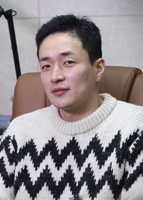 스물 이병헌 감독 인터뷰 영상.